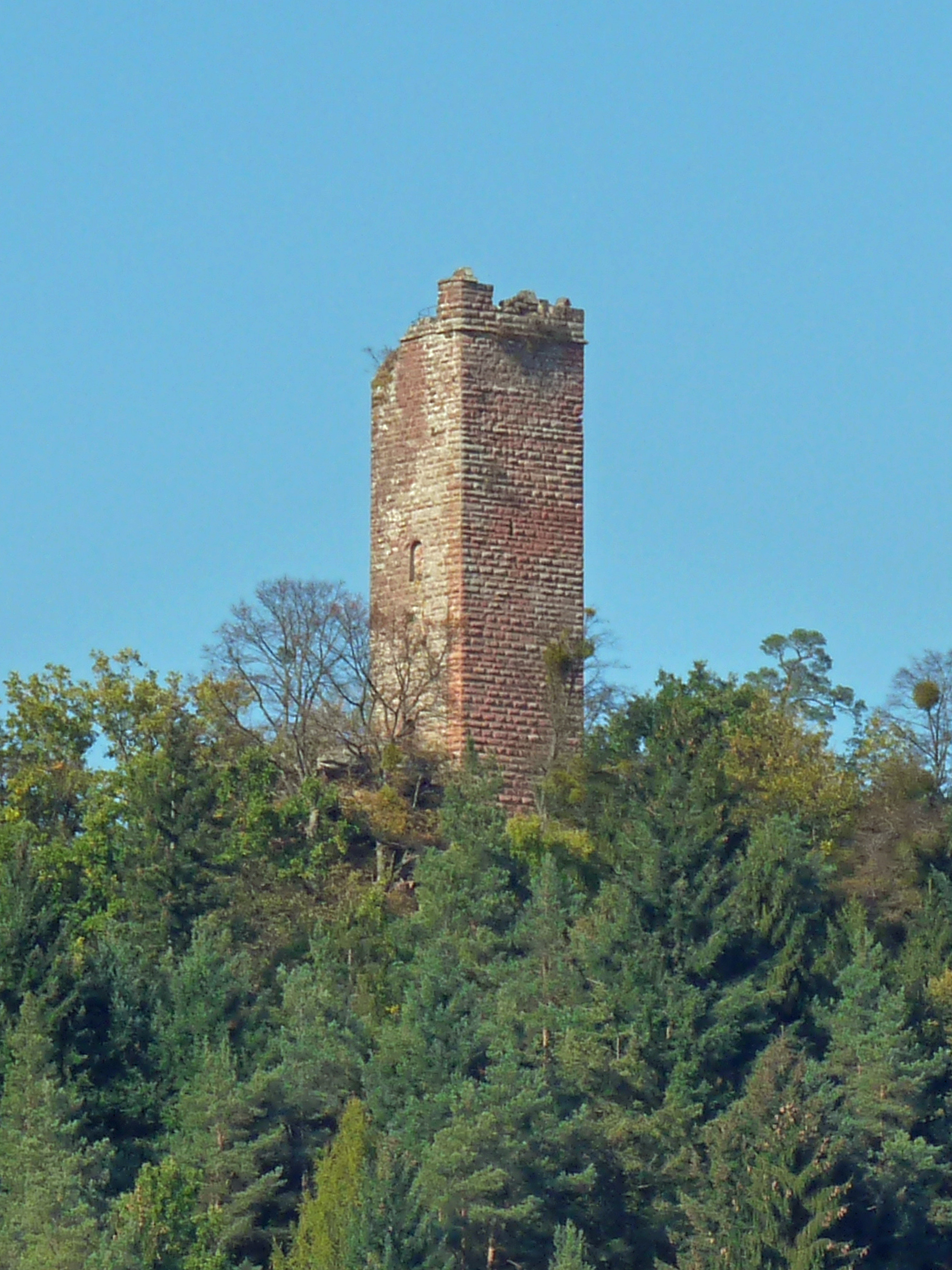 Château de Waldeck (Moselle)